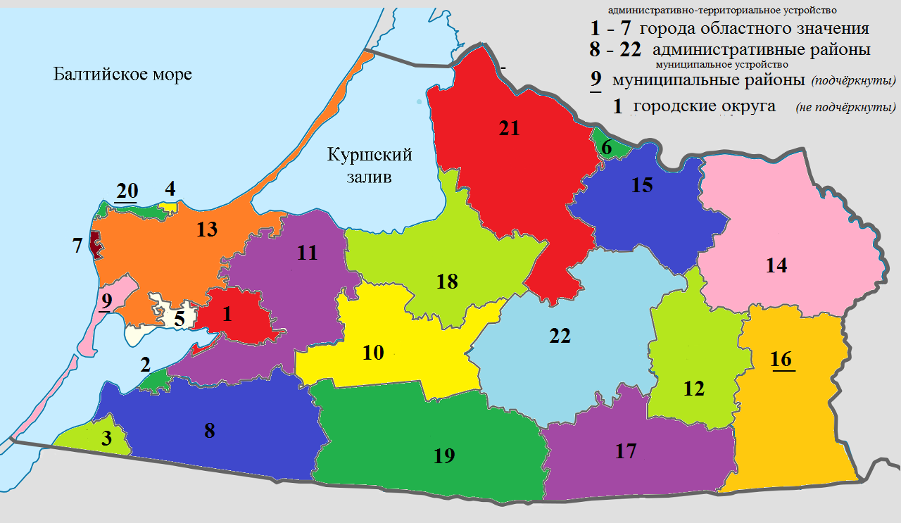 Административно-территориальное деление Калининградской области